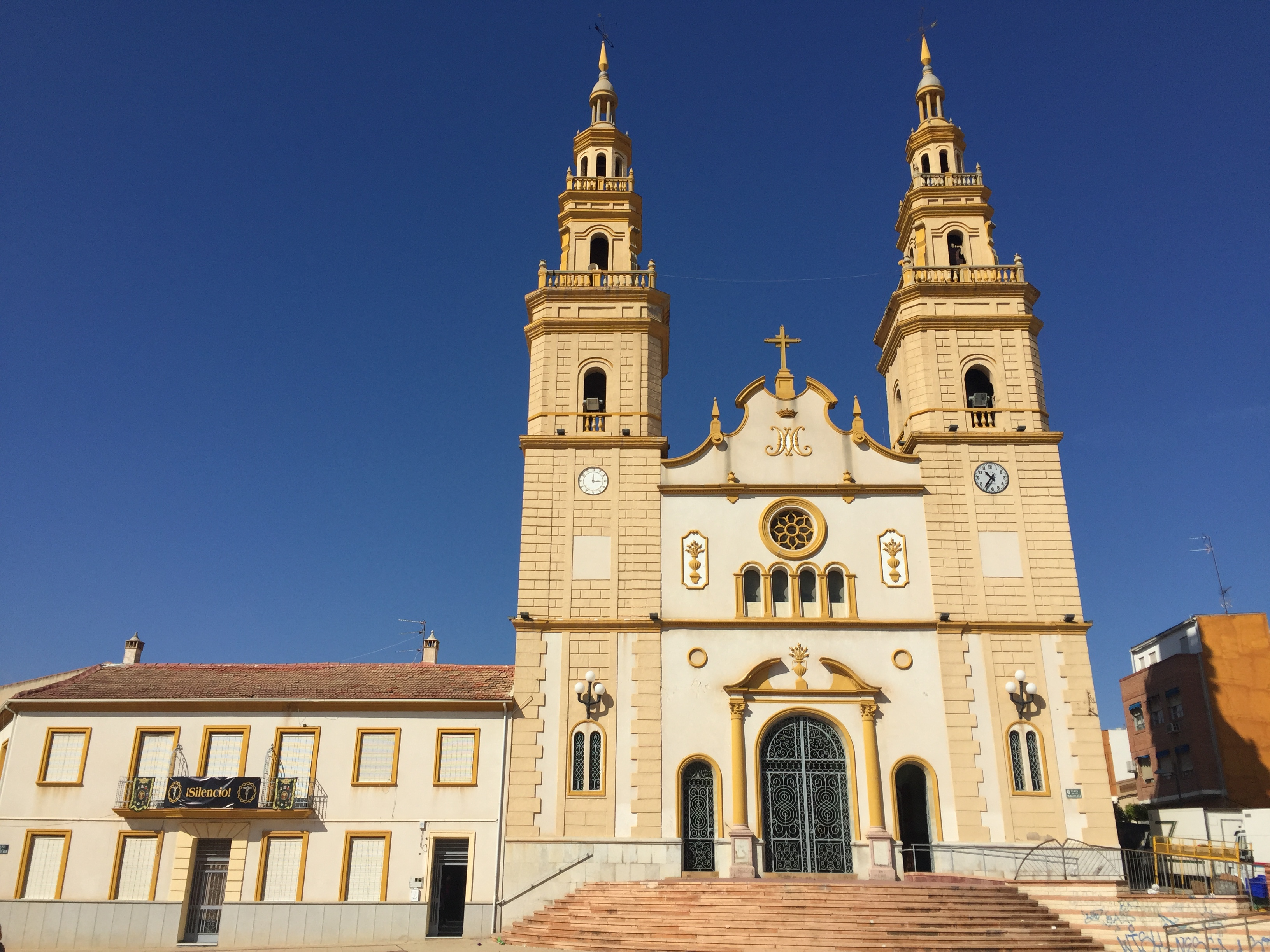 Imagen frontal de la iglesia parroquial Nuestra Señora de la Asunción